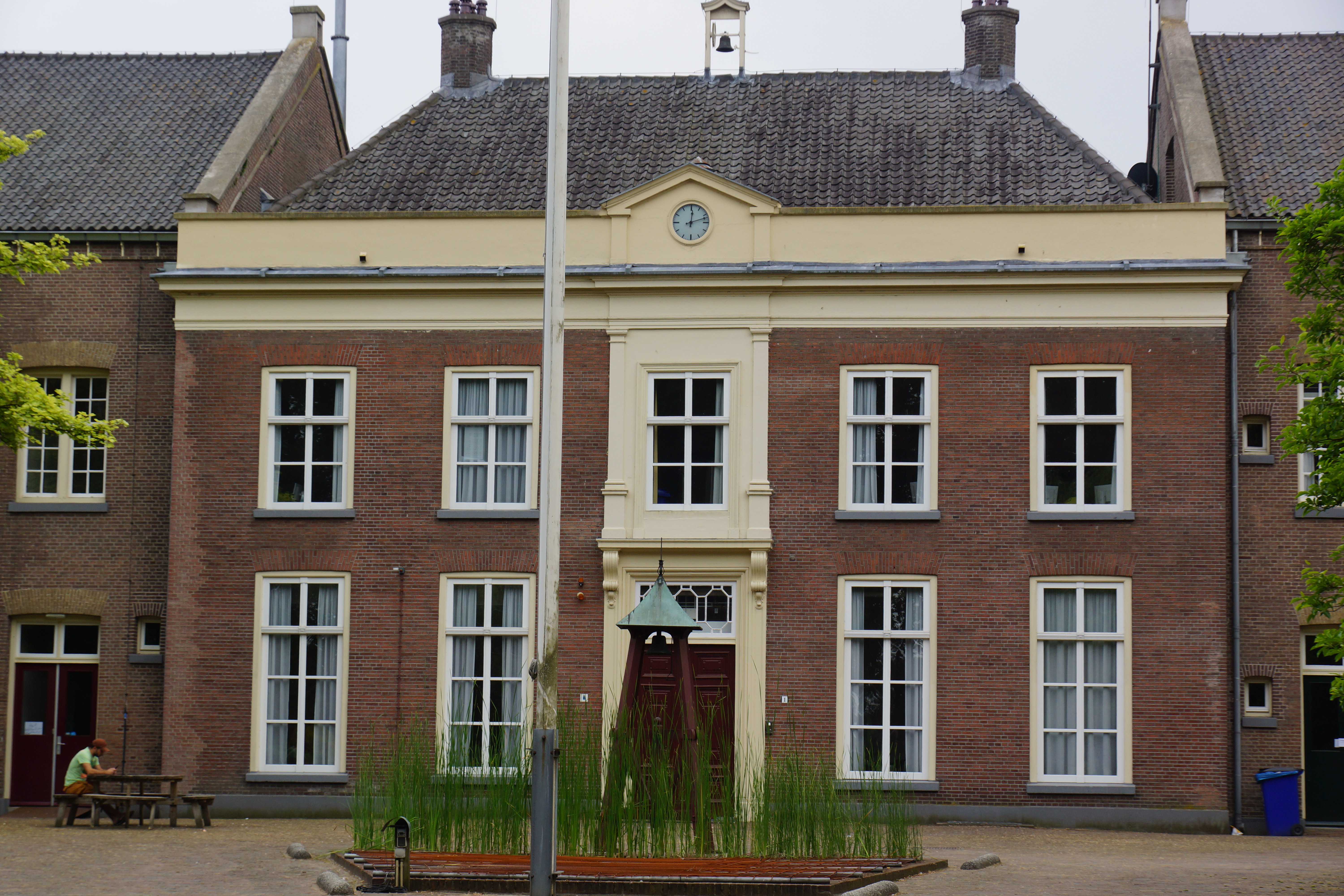 Kruisberg Doetinchem herenhuis 150614 (2)